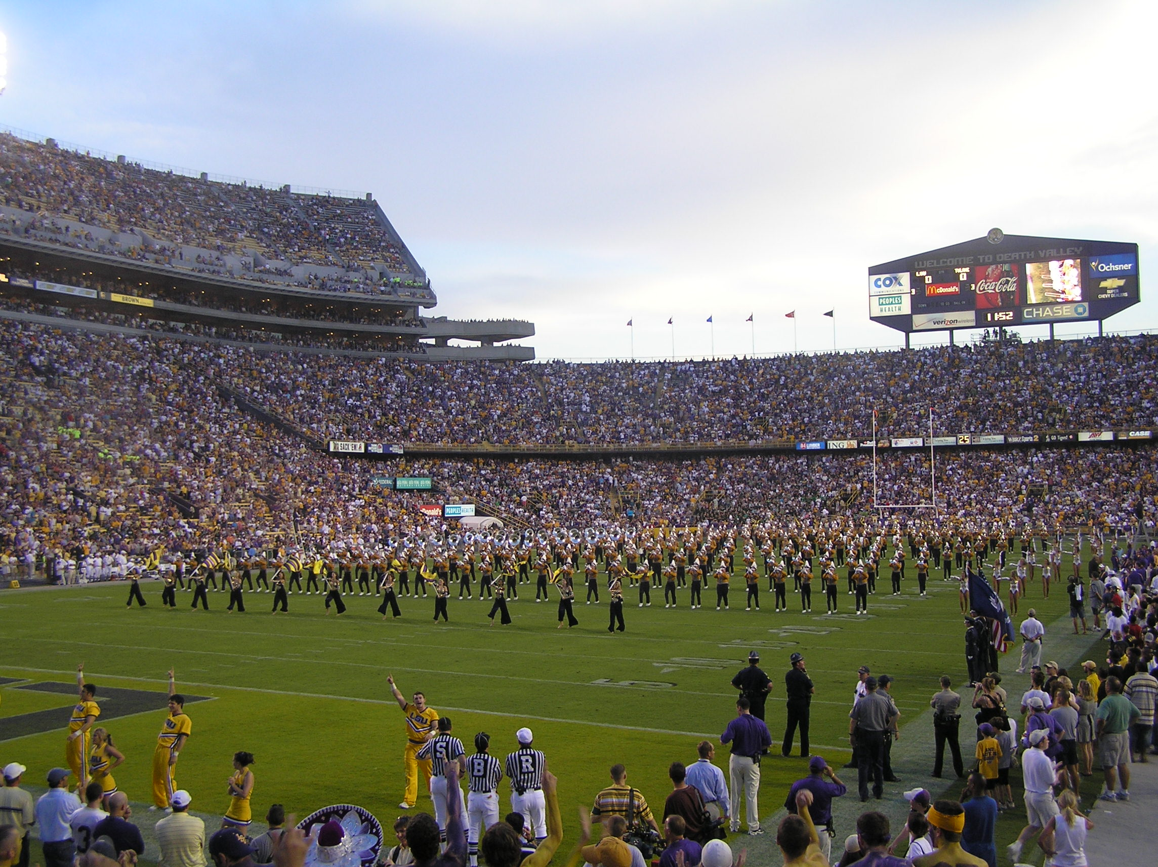 Tulane Grren Wave vs. LSU Tigers, Tiger Stadium (LSU), September 23, 2006